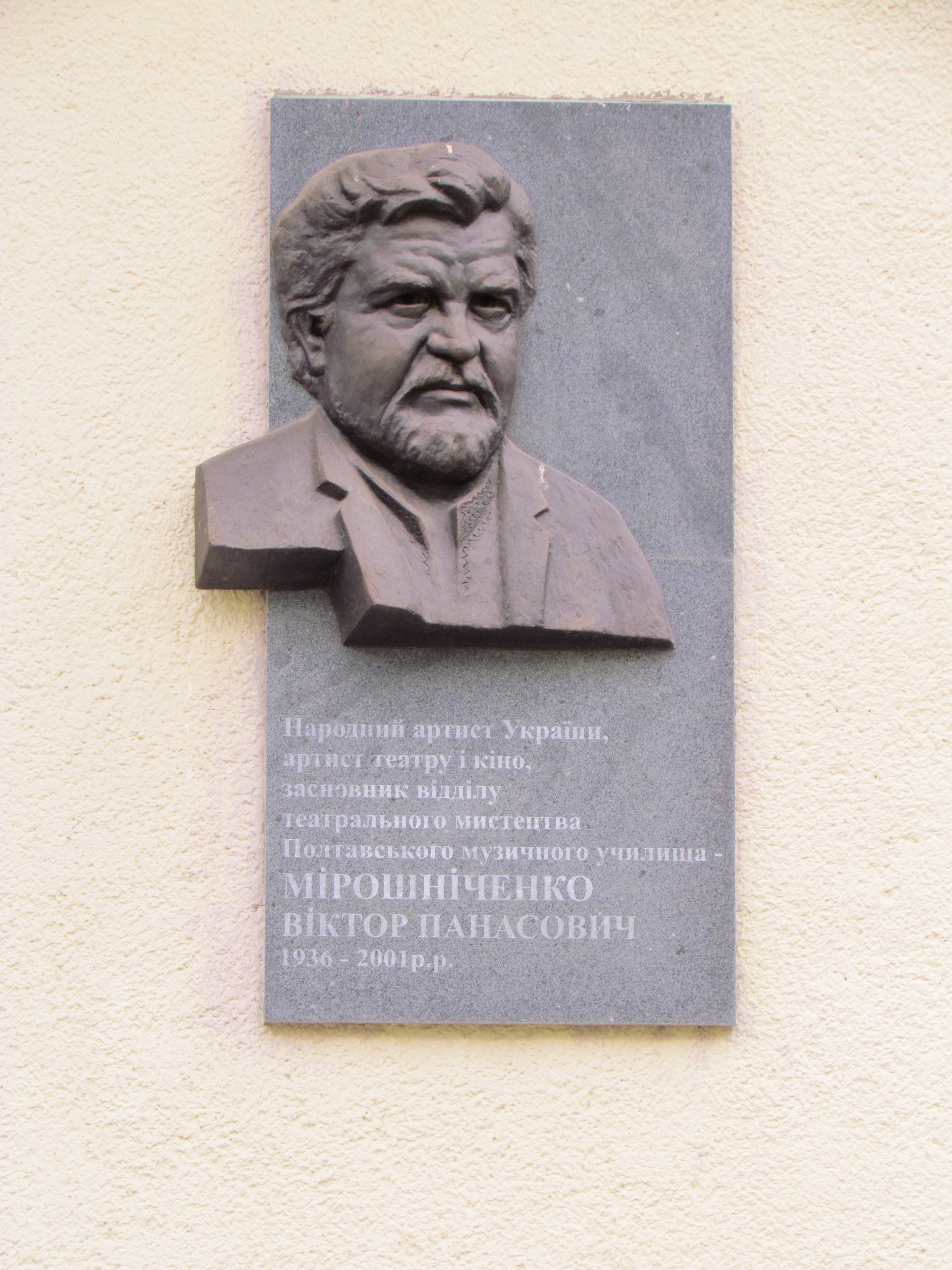 Меморіальна дошка В.Мірошниченка